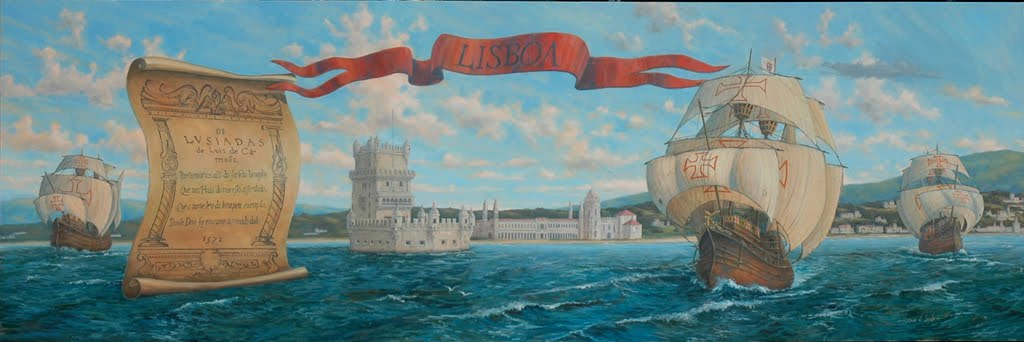 87 - Cortejo "Partimo-nos assim do santo templo Que nas praias do mar está assentado, Que o nome tem da terra, para exemplo, Donde Deus foi em carne ao mundo dado. Certifico-te, ó Rei, que se contemplo Como fui destas praias apartado, Cheio dentro de dúvida e receio, Que apenas nos meus olhos ponho o freio.”